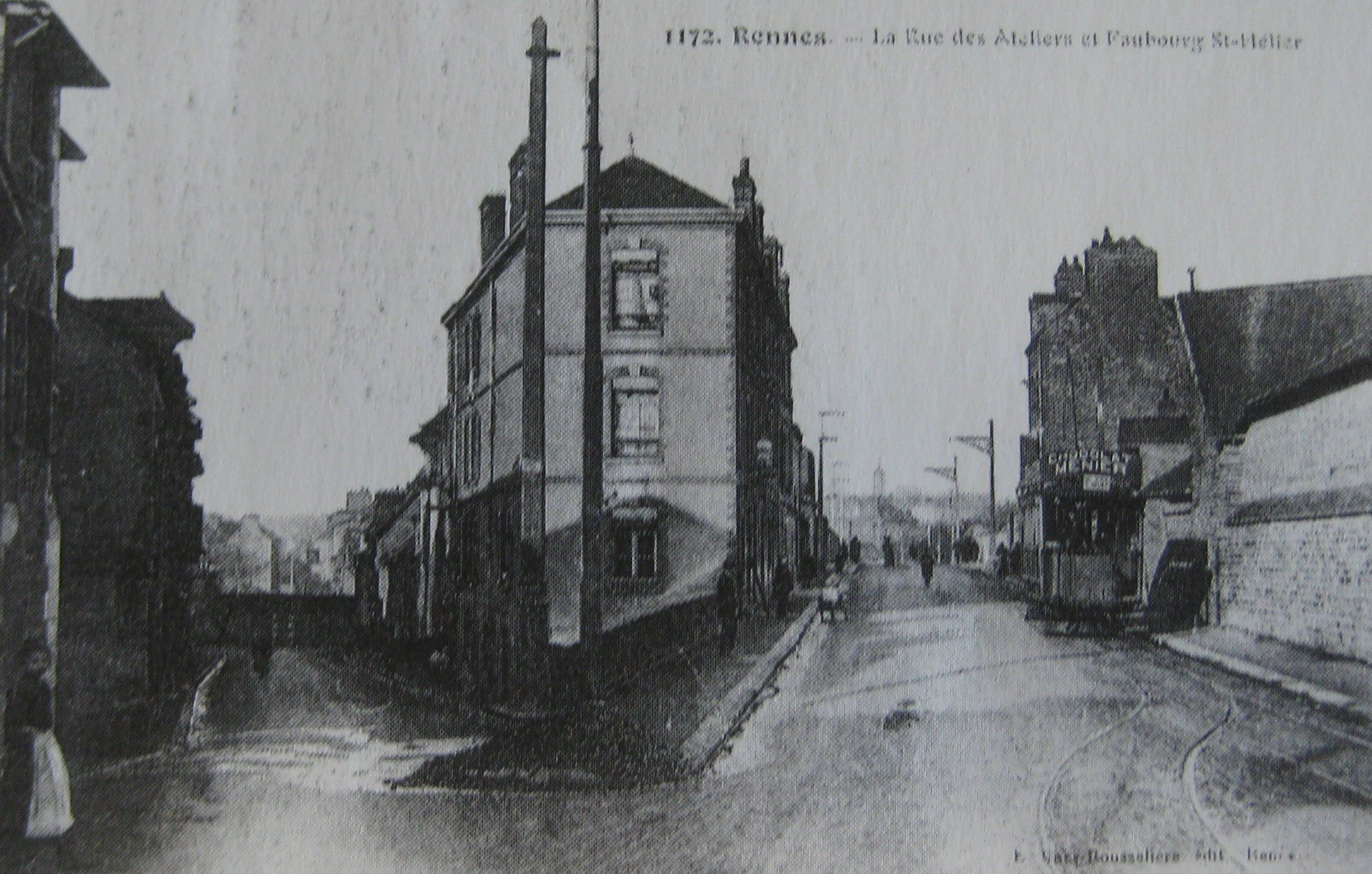 Tramway de Rennes, quartier Saint-Hélier. Texte en haut : « 1172. Rennes. - La Rue des Ateliers et Faubourg Saint-Hélier », en bas « E. Mary-Rousslière édit. Rennes».